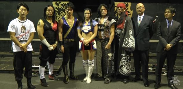 2017.2.2 株式会社MAKAI 設立発表会見